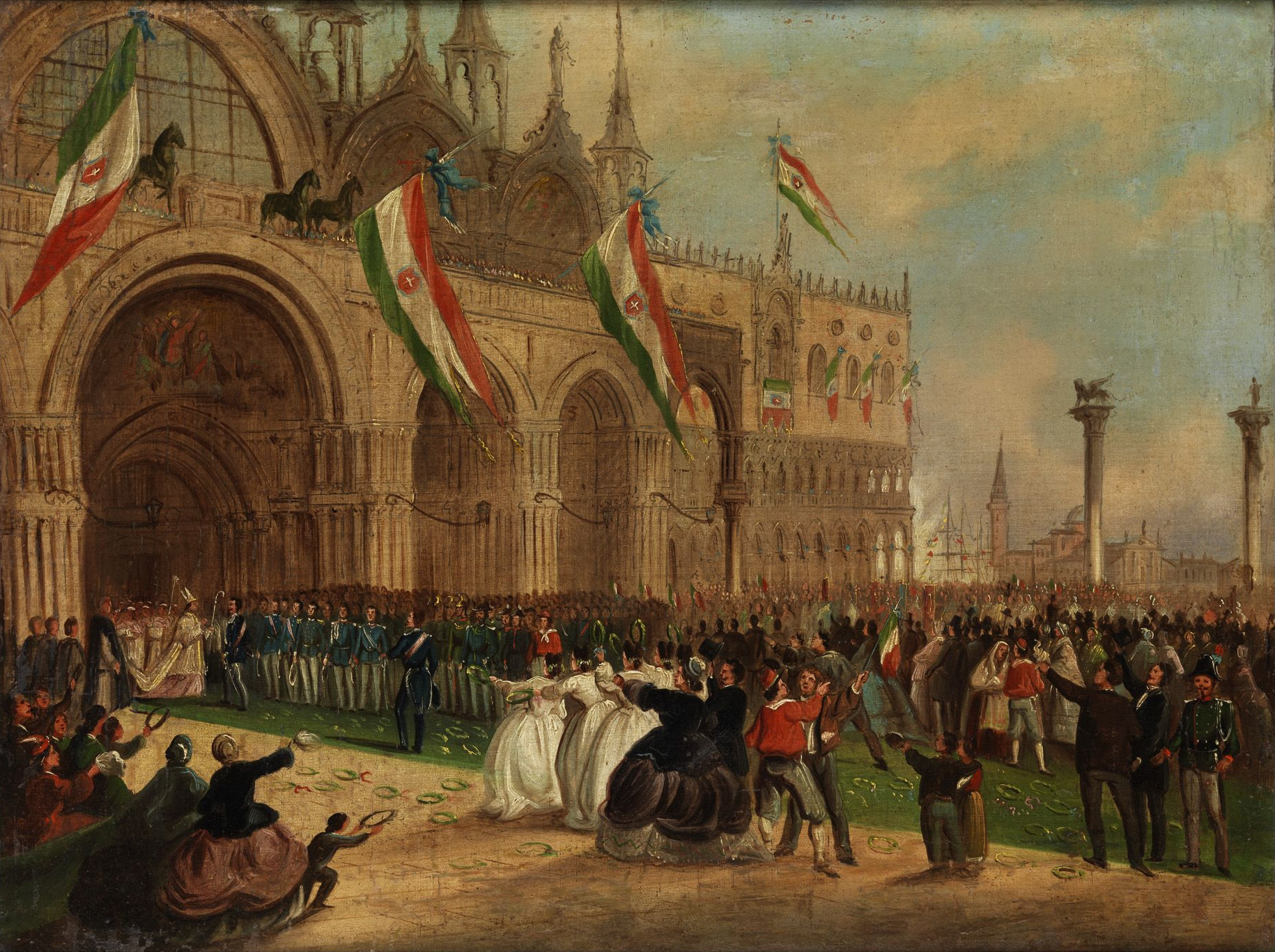 Einzug Vittorio Emanuels in Venedig 1866, Empfang beim Patriarchen von Venedig vor der Markuskirche. Öl auf Leinwand.